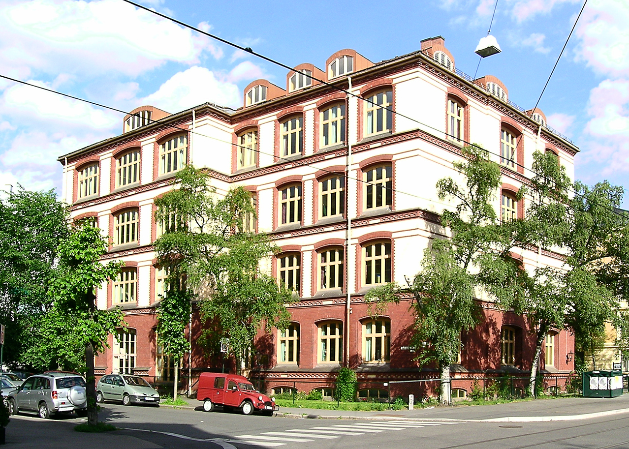 Bjørknes privatskole, Løvenskiolds gate 1, Oslo. Oppført for Frk. Rolls Pigeinstitutt 1898; arkitekt Hjalmar Welhaven.